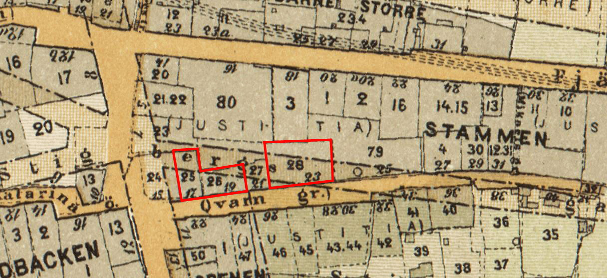 Karta över Stockholm visande del av kvarteret Stammen